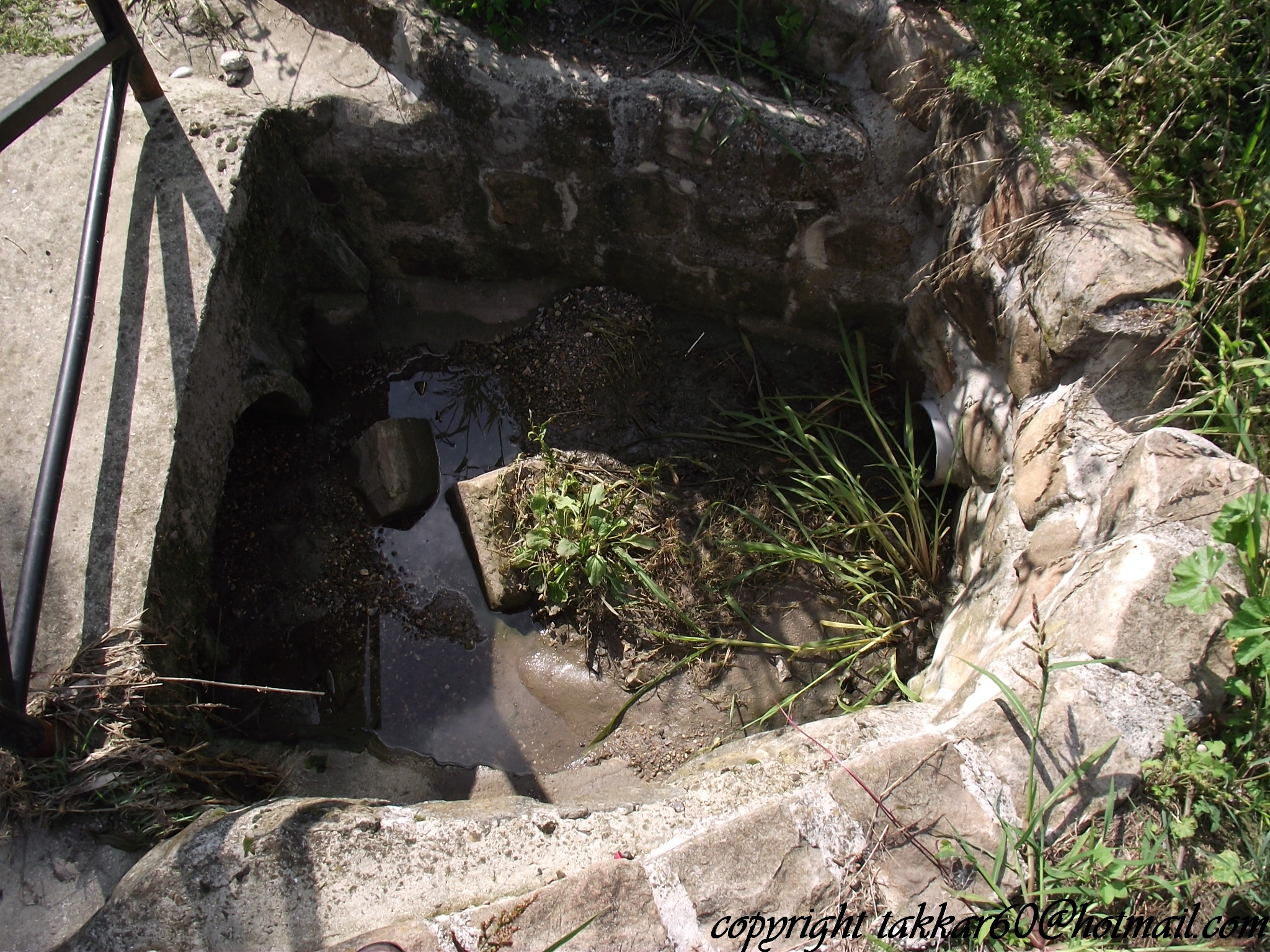 Source du matz a Canny-sur-Matz lieu dit du bouillon